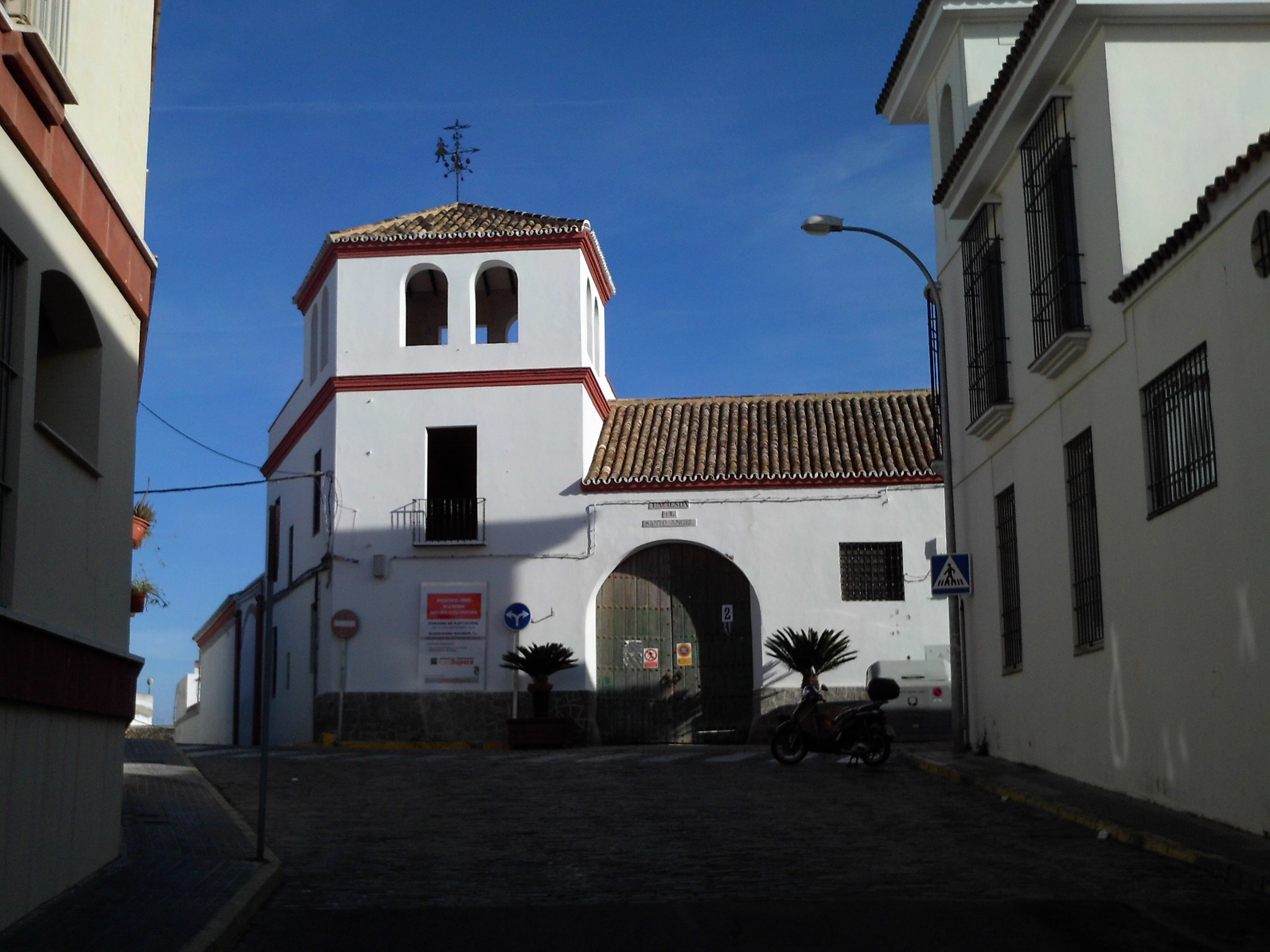 Hacienda del Santo Ángel. Gines, provincia de Sevilla, Andalucía, España.